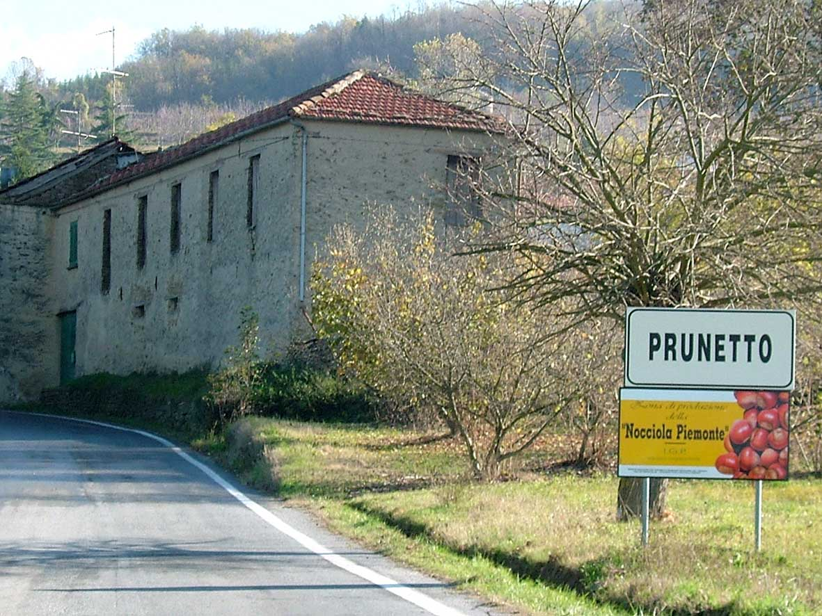 Prunetto CN